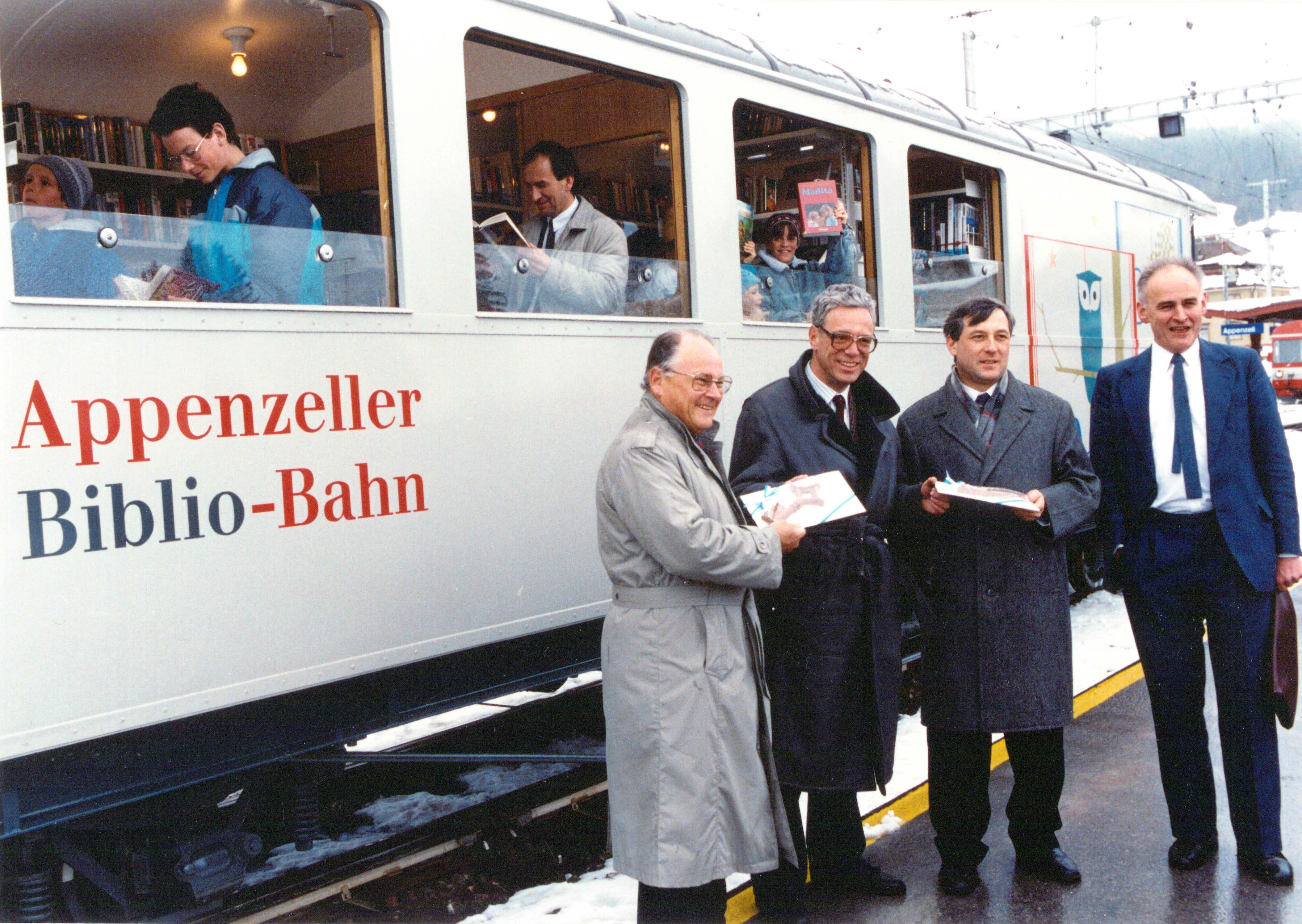 Eröffnung der Appenzeller Bibliobahn in Appenzell. Carlo Schmid-Sutter (2.v.r.) und Peter Wegelin (1.v.r.)